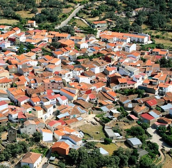 Vista aérea del municipio español de Aceituna, en la provincia de Cáceres. Cedida a Flickr con licencia Creative Commons por la Excma. Diputación Provincial de Cáceres.